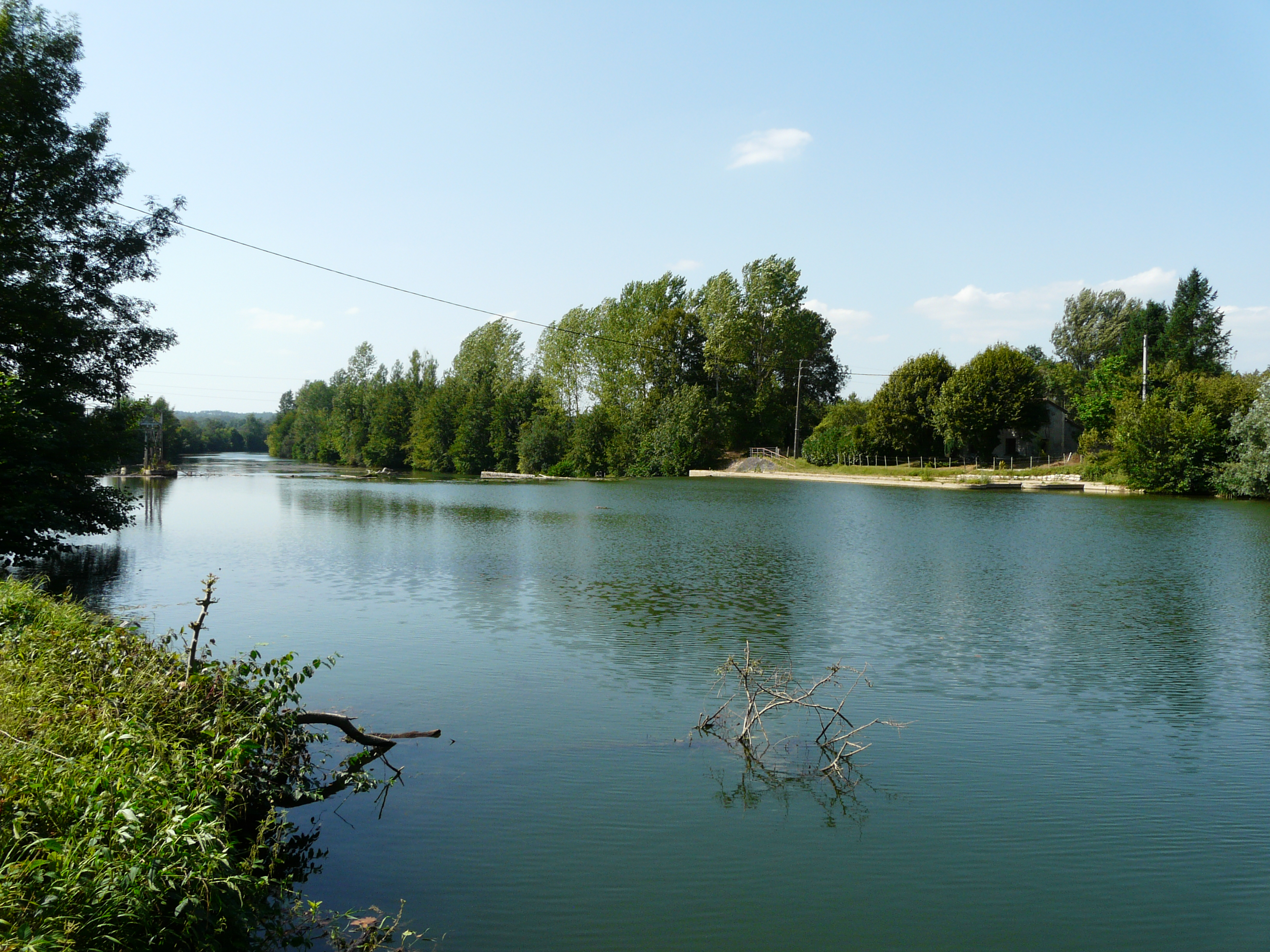 Vue depuis la Caillade, l'Isle entre Sourzac (à gauche) et Saint-Louis-en-l'Isle (à droite), Dordogne, France. Vue prise en direction de l'aval.